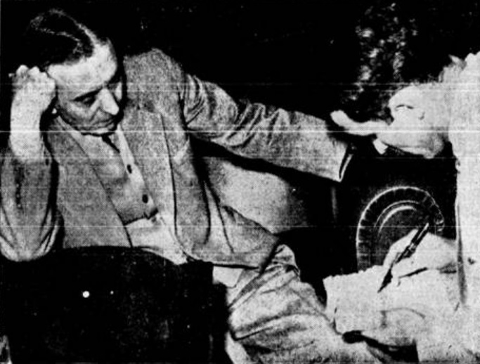 O secretário da superintendência da ferrovia São Paulo Railway Baltazar Fidelis concede entrevista a um repórter do jornal "Correio Paulistano" durante a greve ferroviária de 1946.